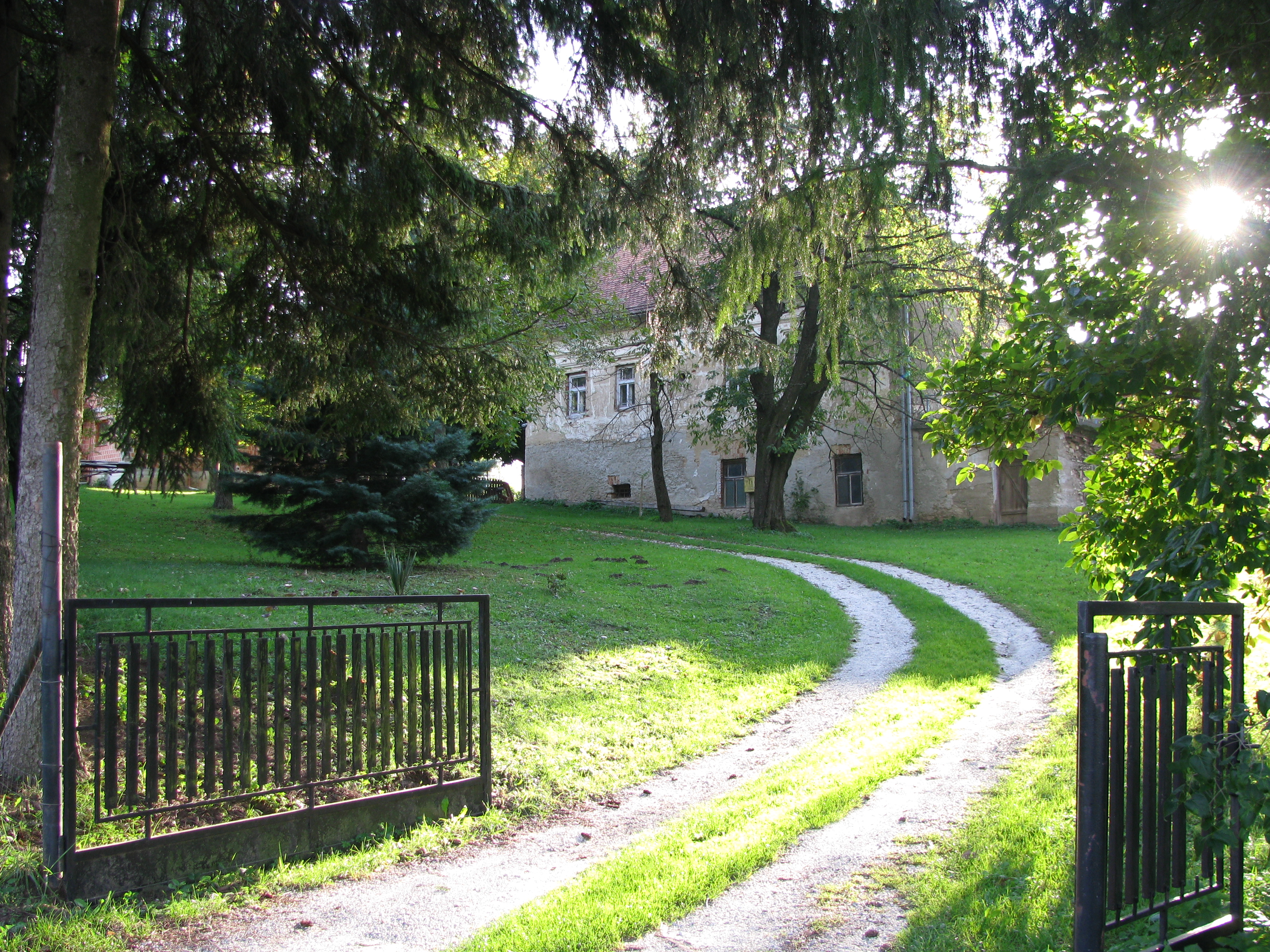 Kurija Cerje Tužno